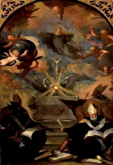 Adoración de la Eucaristía, óleo sobre lienzo, Madrid, colección Santamarca